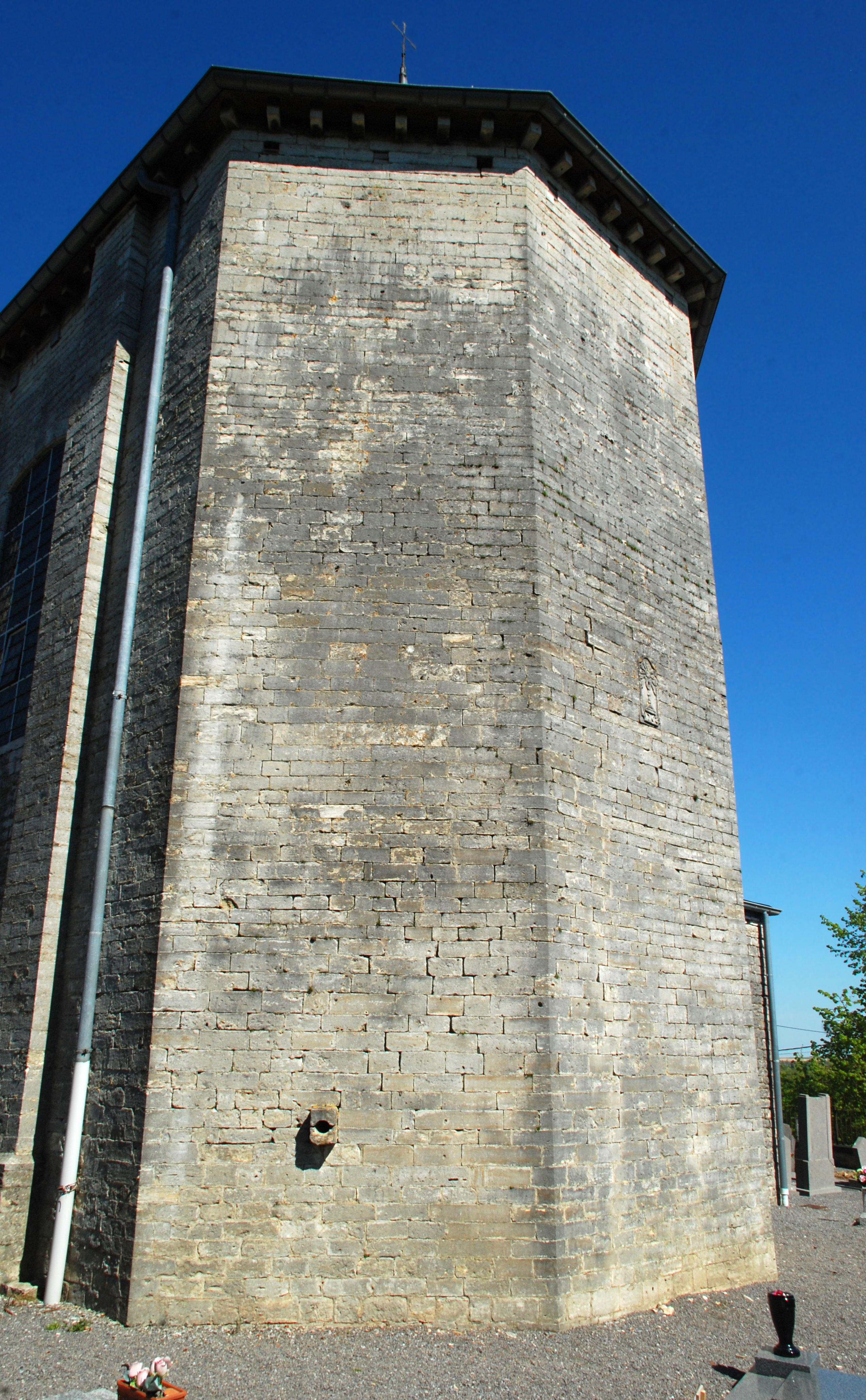 Belgique - Brabant wallon - Jodoigne - Saint-Remy-Geest - Église Saint-Remy